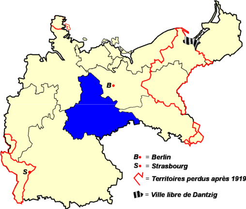 Territoires couverts par la Fédération de football d'Allemagne centrale (VMBV) de 1904 à 1933 Catégorie:Logo Fédérations Allemandes de Football